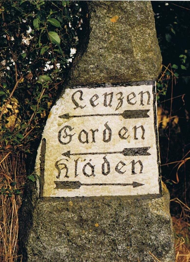 Wegweiserstein an der ehemaligen Garder Mühle im Westen der Schwinzer Heide.